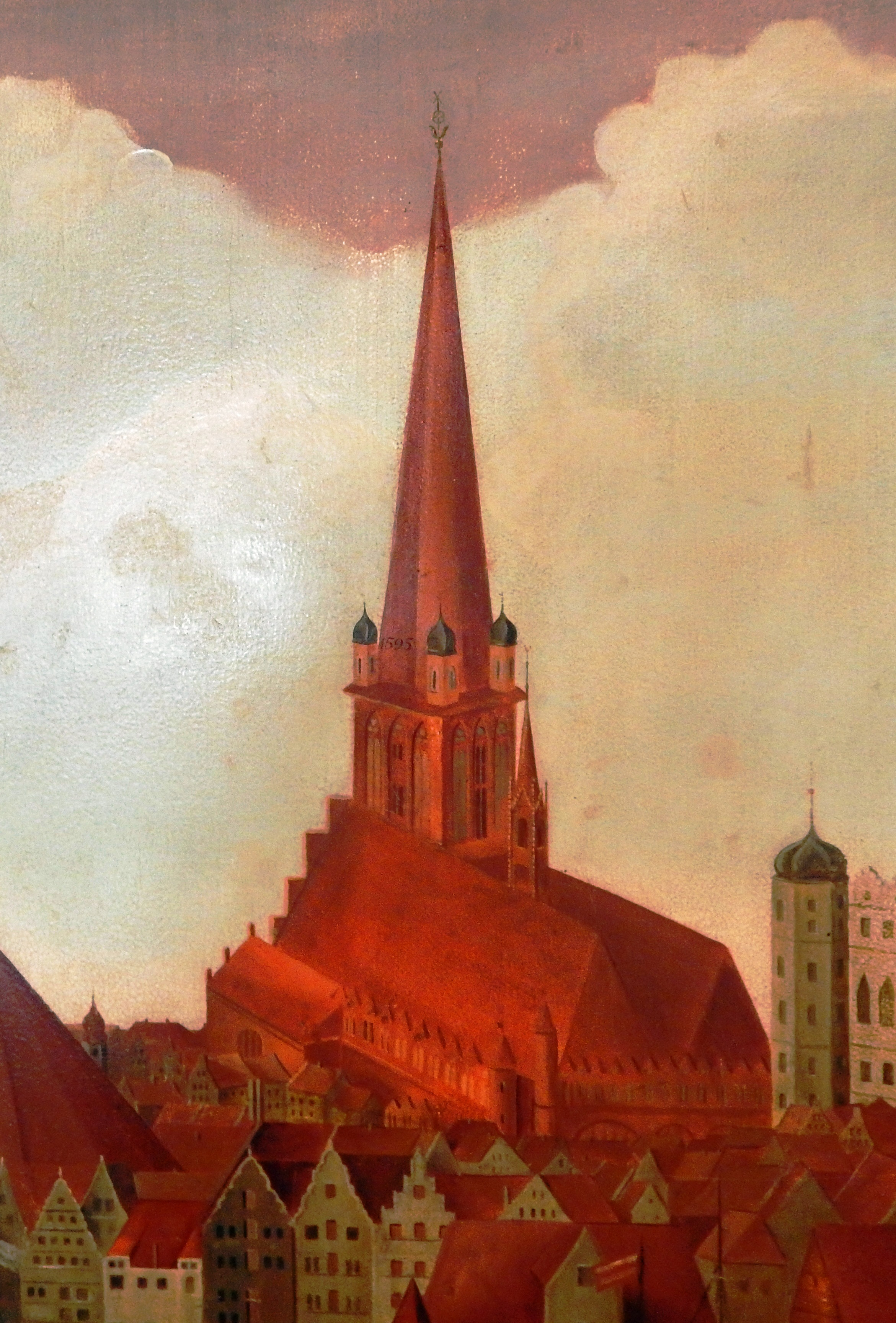 Die Marienkirche in Stettin aus einem Stadtpanorama (Ausschnitt). Kopie nach einer älteren Vorlage von 1624.